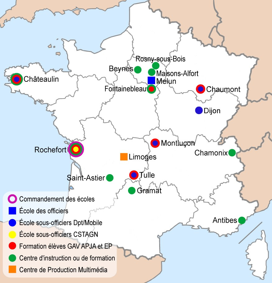 Carte des écoles et des centres d'instruction de la gendarmerie nationale française (2016)